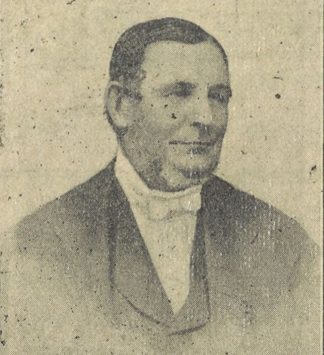 Théophile Bidard de la Noë, photo publiée dans L'Heure Bretonne du 30 mai 1942